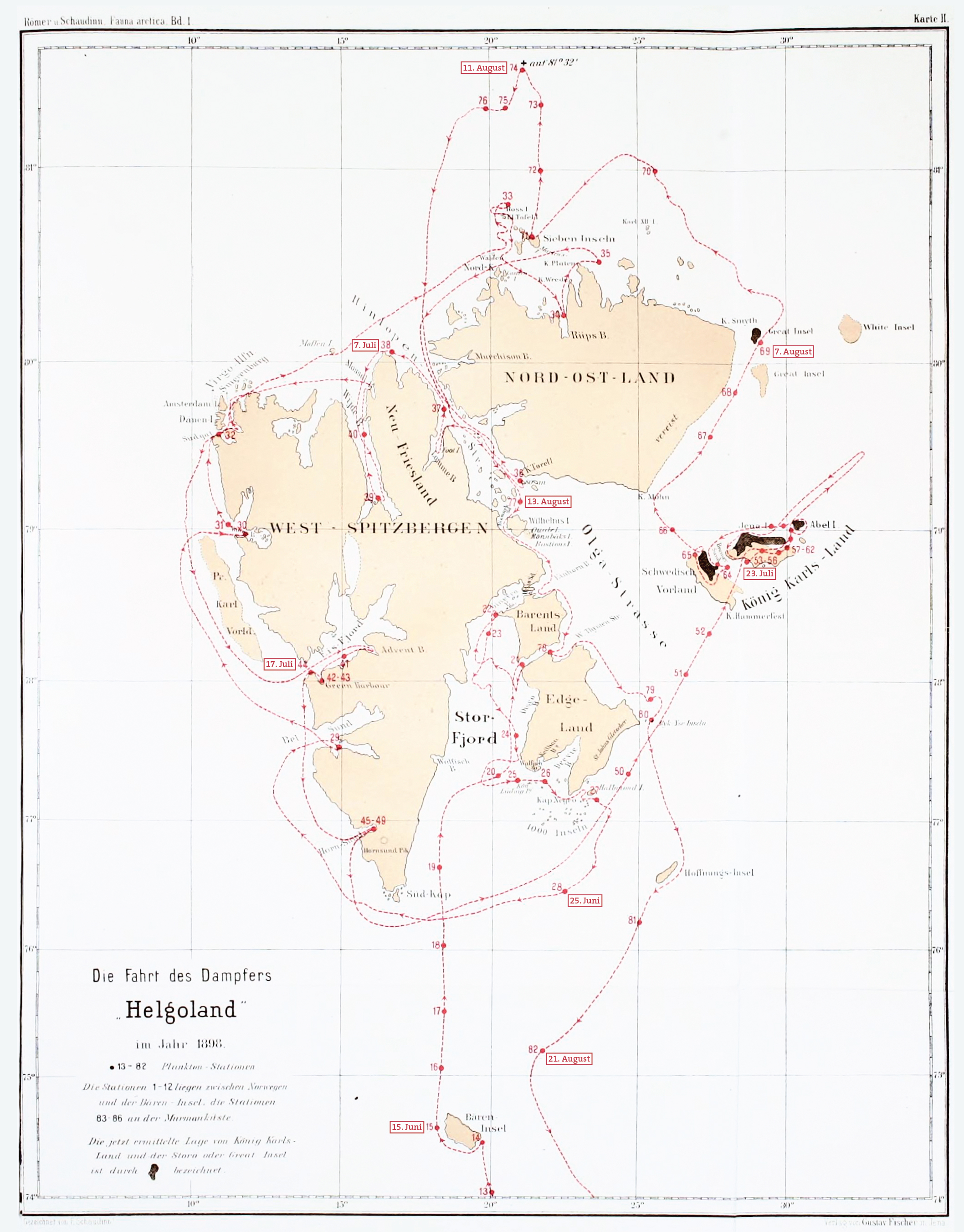 Route des Dampfers Helgoland um Spitzbergen 1898